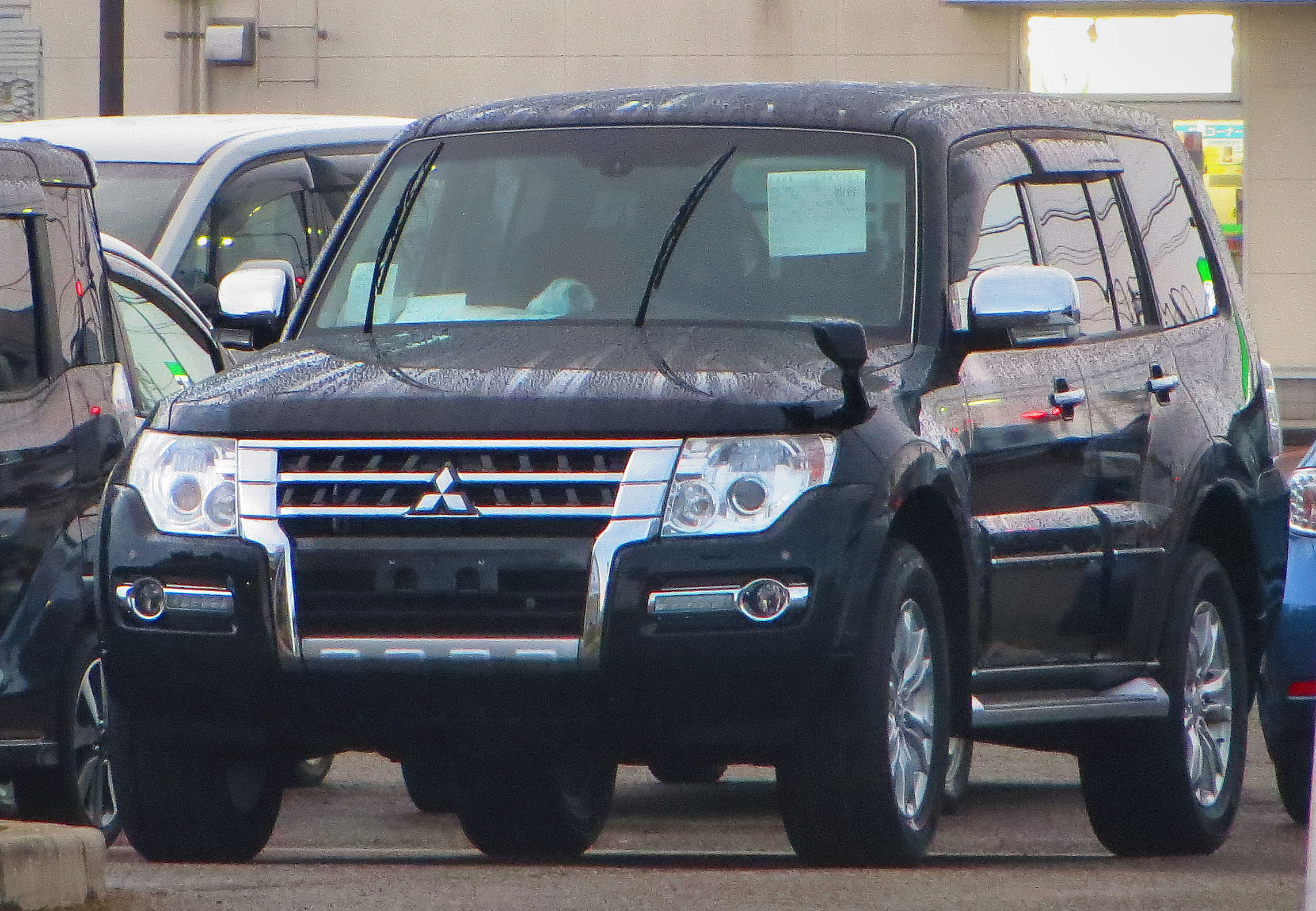 三菱 パジェロ ロングボディ Super Exceed 3200DID, 2014